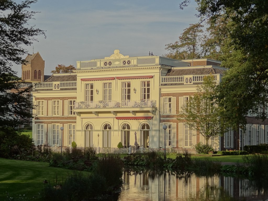 Landgoed Rennenenk. In romantisch park gelegen neo-klassiek landhuis, baksteen, bestaande uit een hoger middengedeelte tussen lagere vleugels. Zuidgevel met fronton. Schuiframen. Velperweg 139 als vrijstaand landhuis met naaste omgeving van het park. (monument 8366)